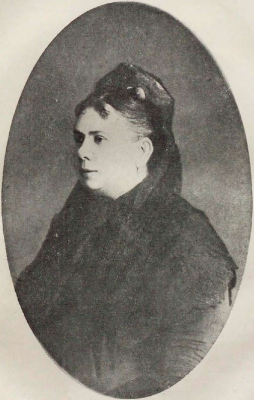 Дарья Михайловна Леонова (1829, по др. данным, 1834, или 1835 — 1896) — русская оперная певица-контральто.